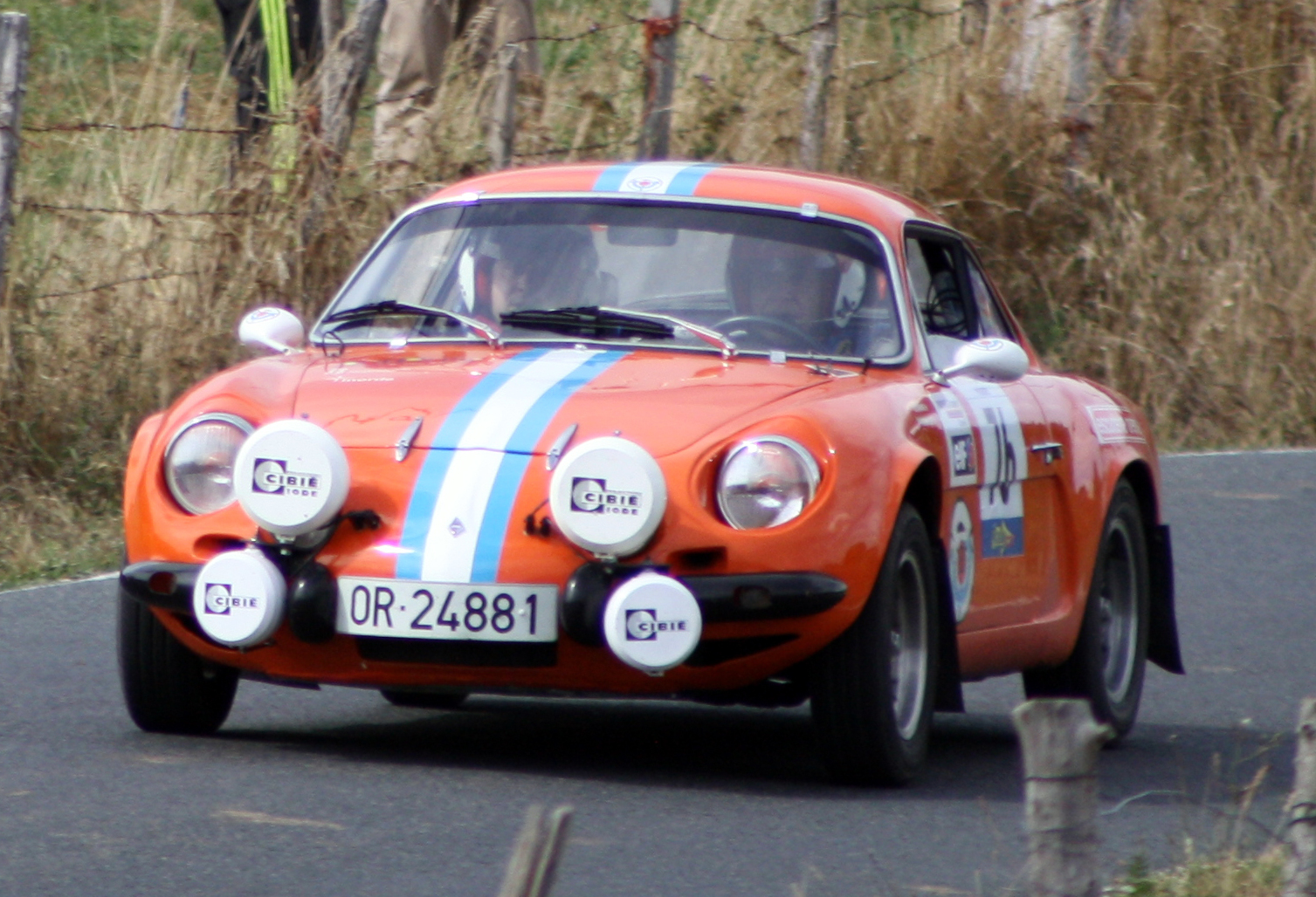 Alpine Luis Aragones, Rally de galicia historico 2012